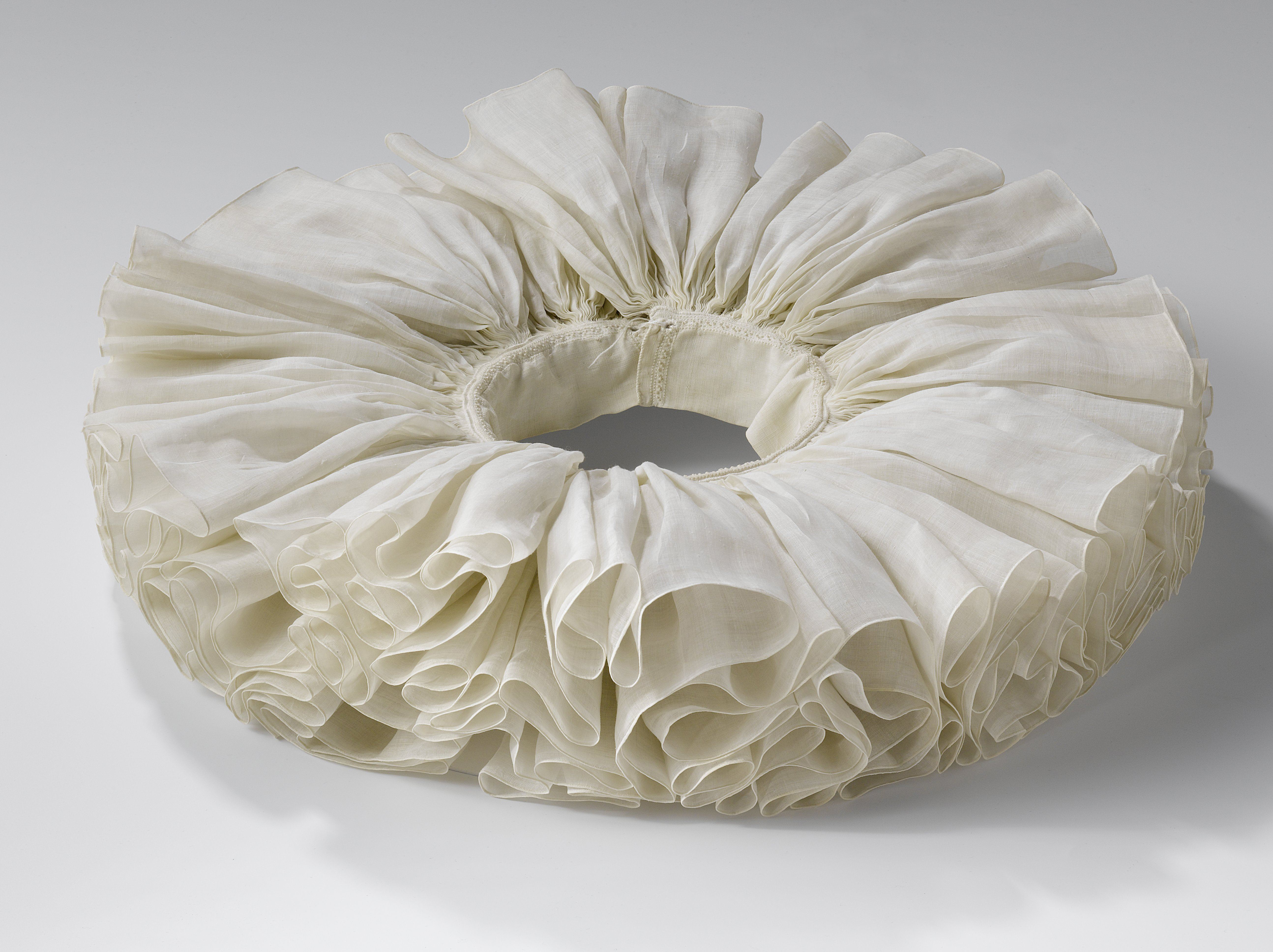 Onregelmatig golvende plooikraag van linnenbatist, bestaande uit een lange strook die aan een linnen boord is geplooid met een kleine randversiering in stiksteek, gemerkt met kruissteek in rode zijde 'CY'. In de boord de initialen C.L. (?) in rode kruissteek. Model: aan een dubbel geslagen, linnen boord van 38 cm is met extreem fijne plooitjes en steken één lange strook van ca. 19.5m linnenbatist genaaid. De naad tussen de boord en de geplooide strook is versierd met stiksteken en knoopjesteken. De strook heeft een smal rolzoompje. Sluiting middenvoor door middel van twee gefestonneerde ronde gaatjes. De boord is middenachter gemerkt in kruissteken van rode zijde, 'CY'. ca. 1615 - ca. 1635